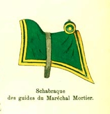 Planche 22 du tome I des « Uniformes de l'armée française », par le docteur Constant Lienhart et le professeur René Humbert. État-major général et guides d'état-major. Détail de la chabraque des guides du maréchal Mortier.